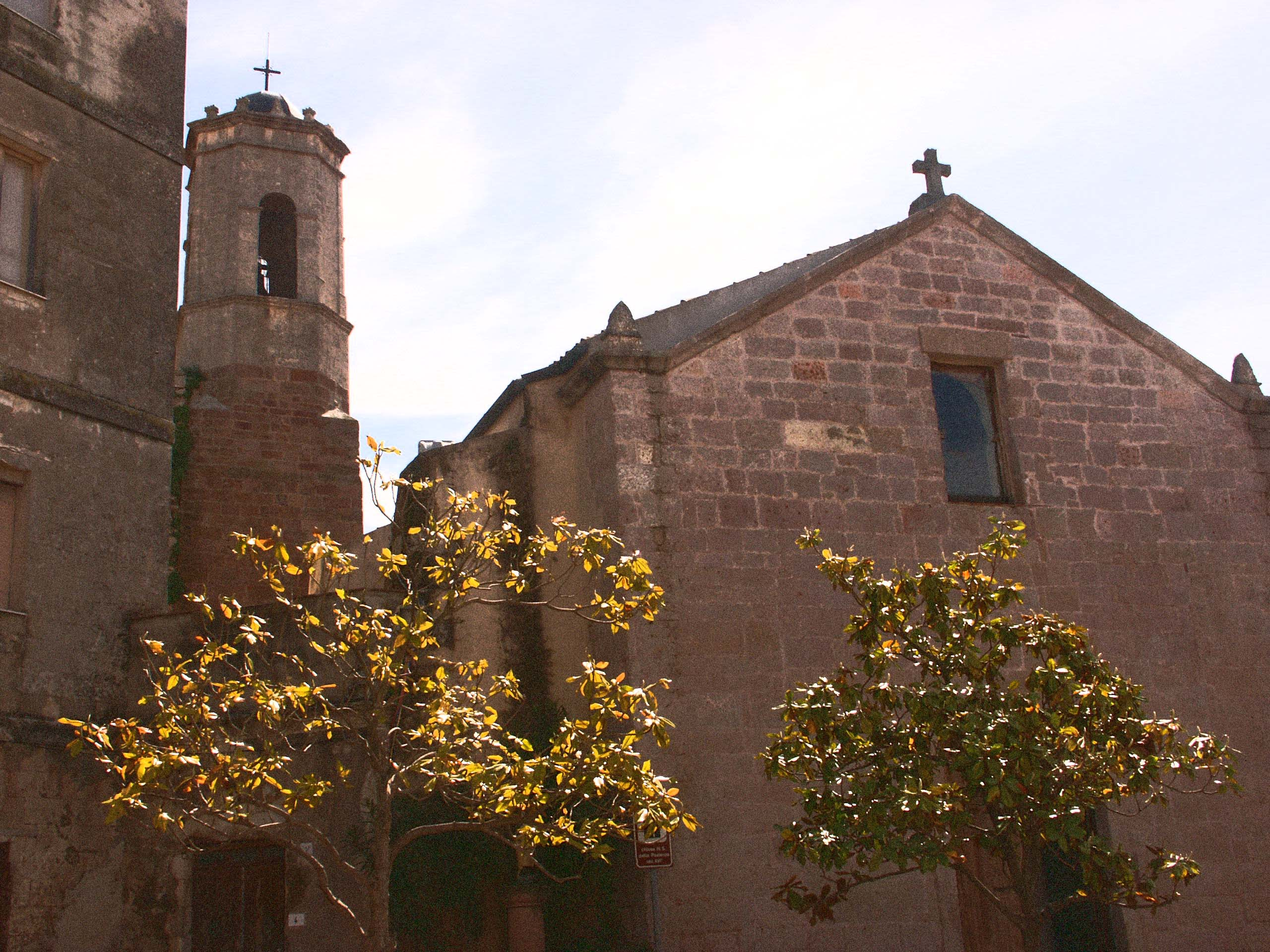 antonio carboni